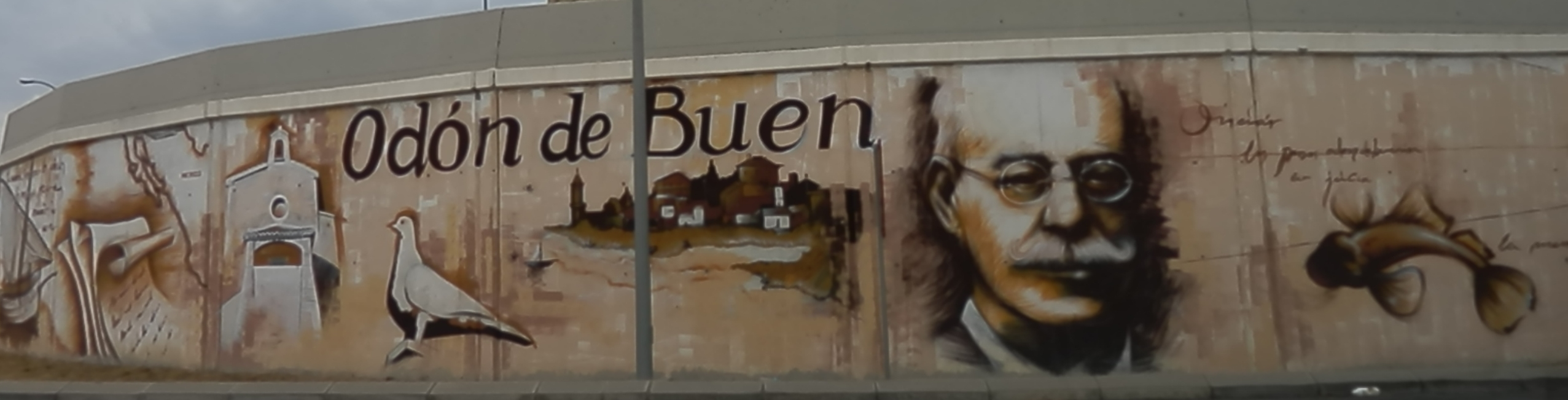 Mural con técnica de grafiti en la localidad de Zuera, Zaragoza, España. Dedicado a Odón de Buen.